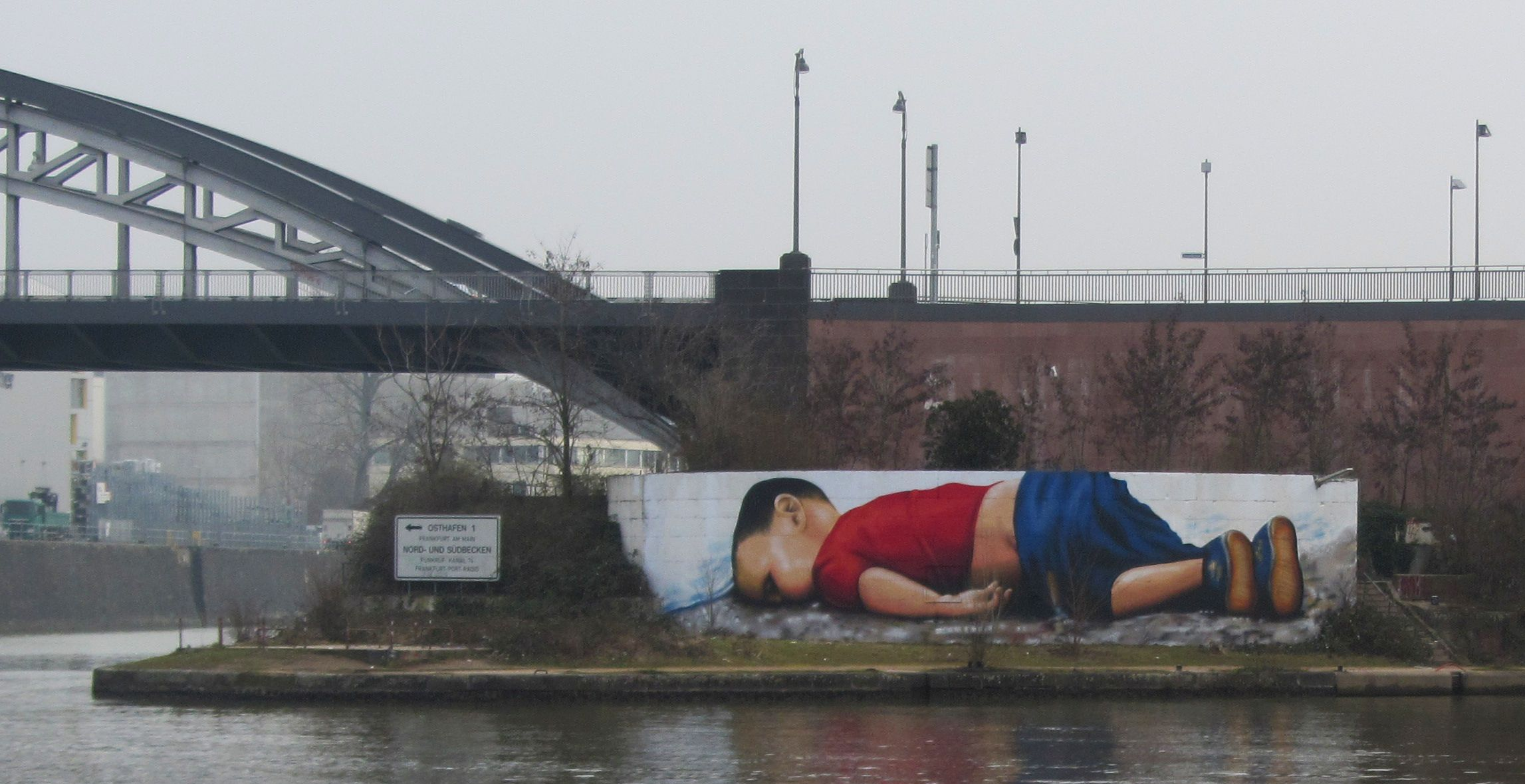 Graffiti-Kopie des Fotos der angeschwemmten Leiche von Alan Kurdi. Ein Werk der Künstler Justus "Cor" Becker und Oguz Sen an der Osthafenmole in Frankfurt am Main, Titel „Europa tot – Der Tod und das Geld“